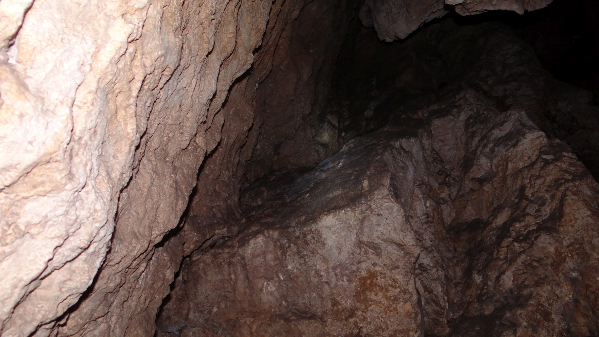 Jaskinia w Ostryszni w skale Cieplarnia w Wąwozie Ostryszni